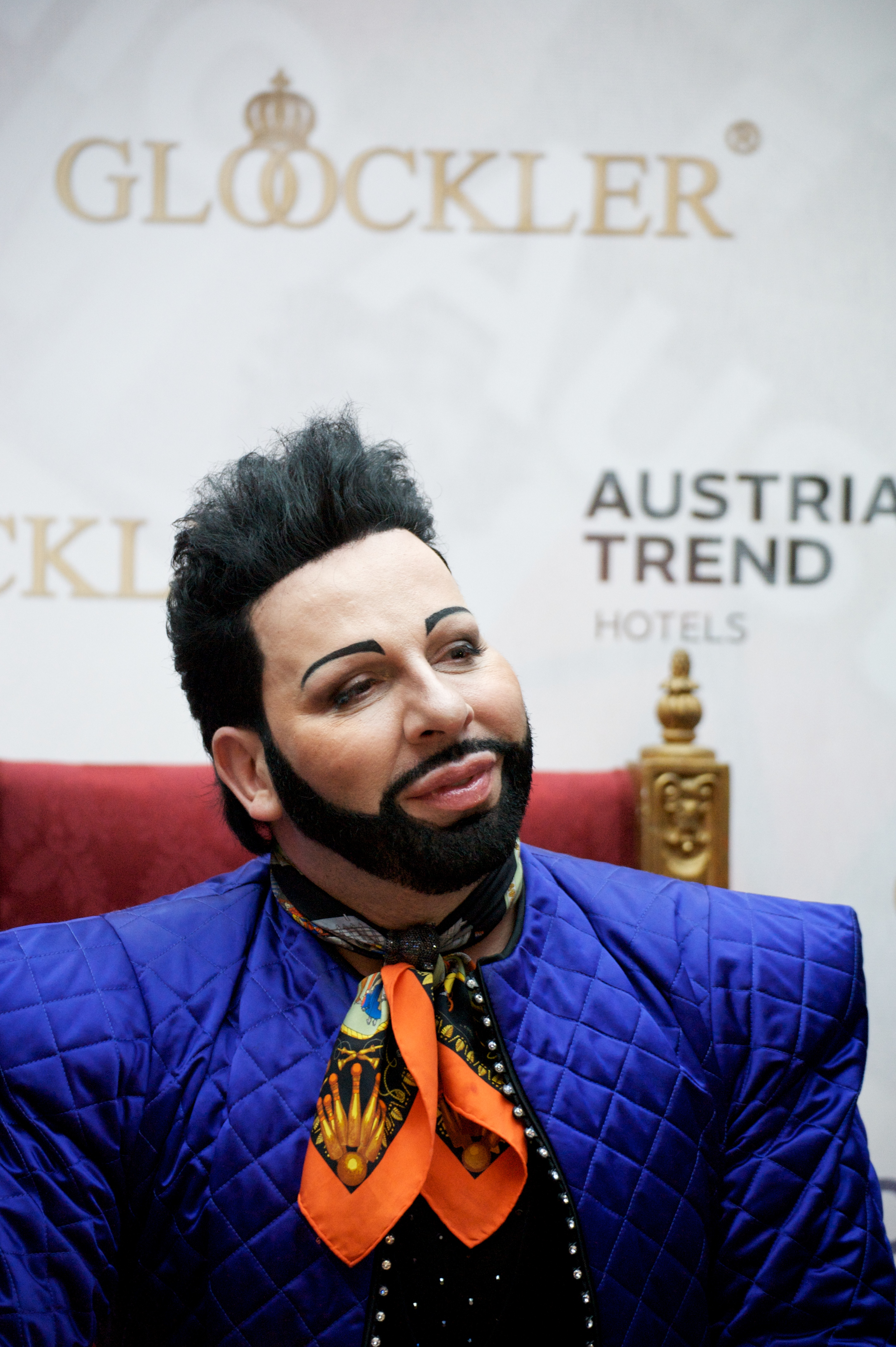 Der Berliner Modedesigner Harald Glööckler während einer Autogrammstunde (am 11. Oktober 2014) im Wiener Donauzentrum.